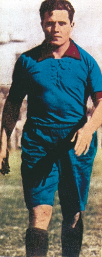 Club Atlético Tigre